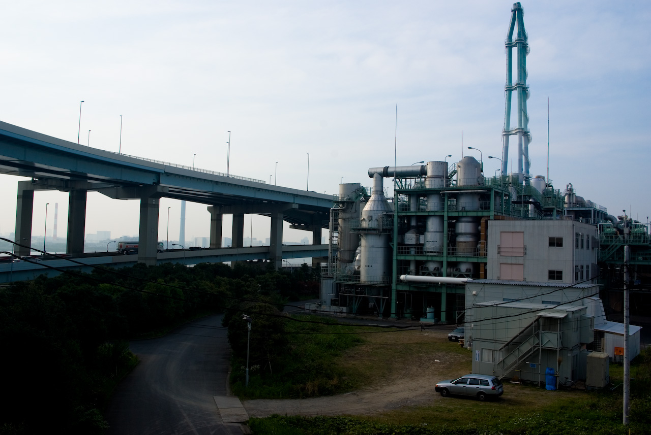 東京都下水道局 葛西水再生センター from 荒川河口橋